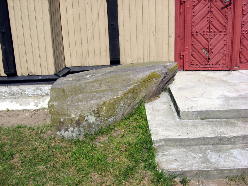 Струбніца. Следавік ля касцёла